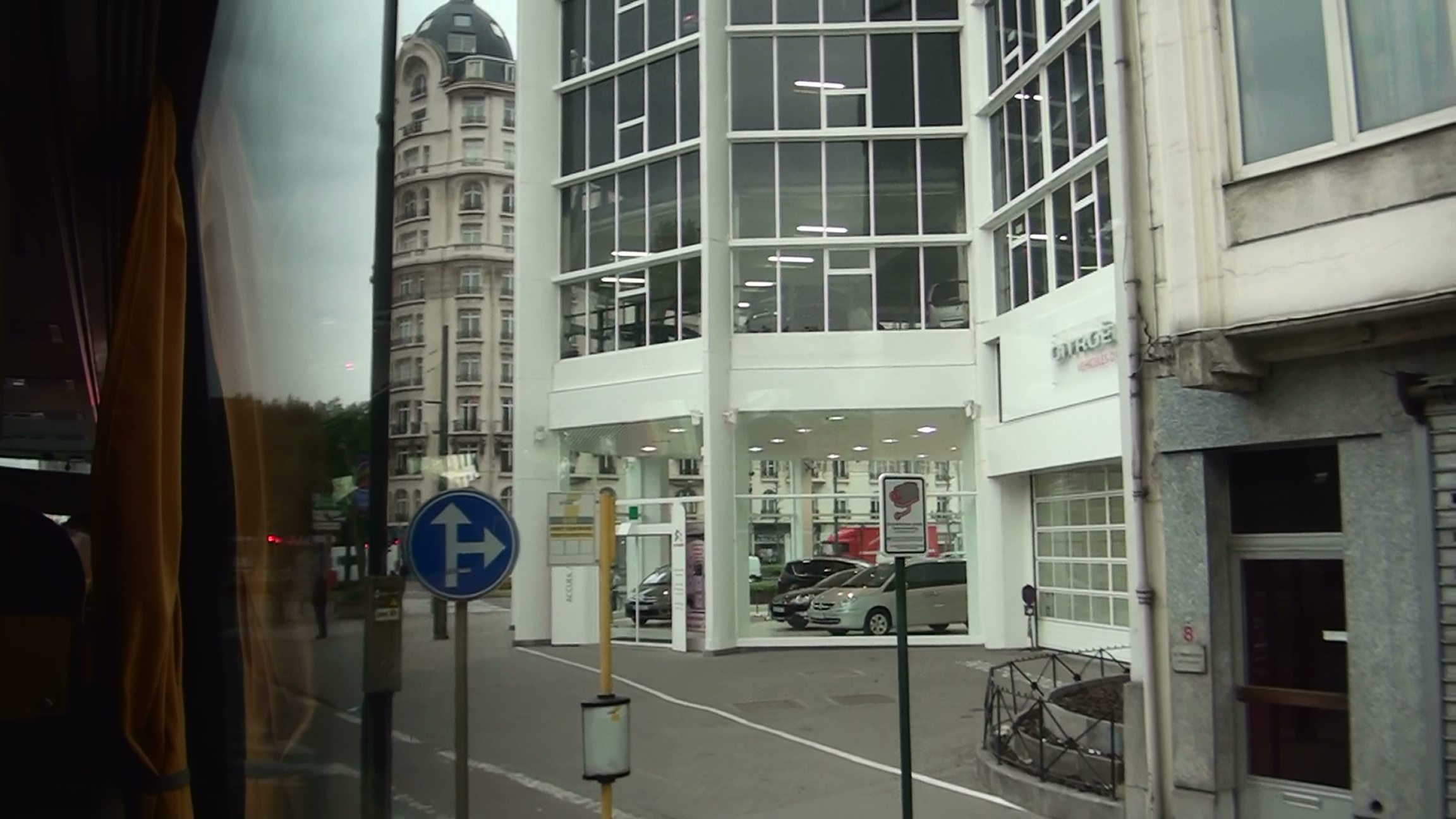 Brussels, Belgium